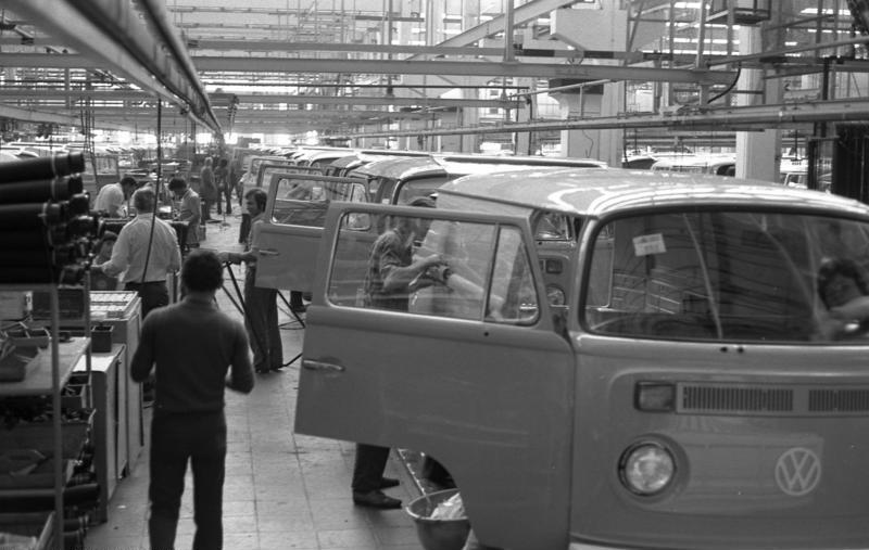 VW-Werk Hannover Transportermontage